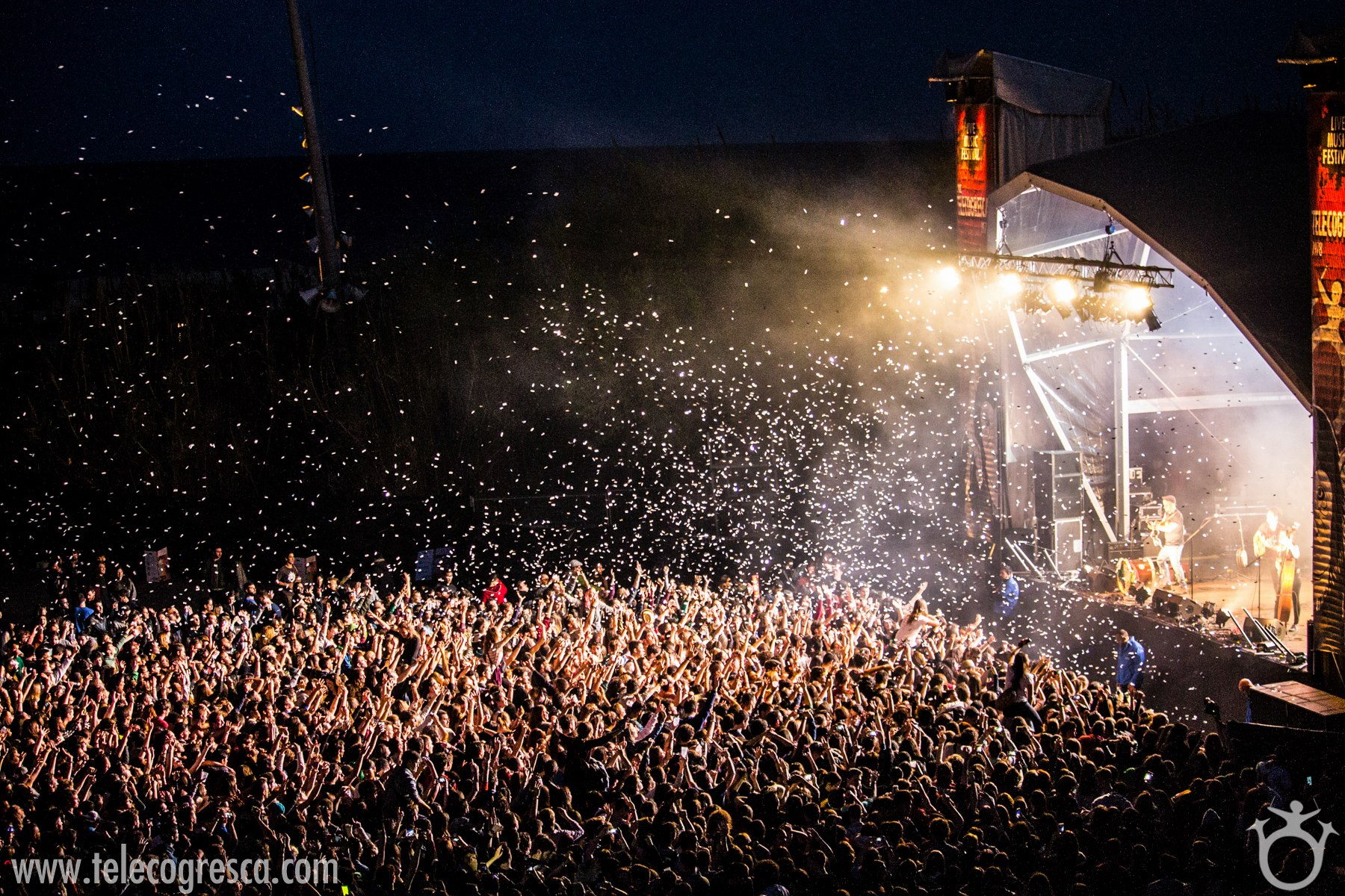 Telecogresca 2016